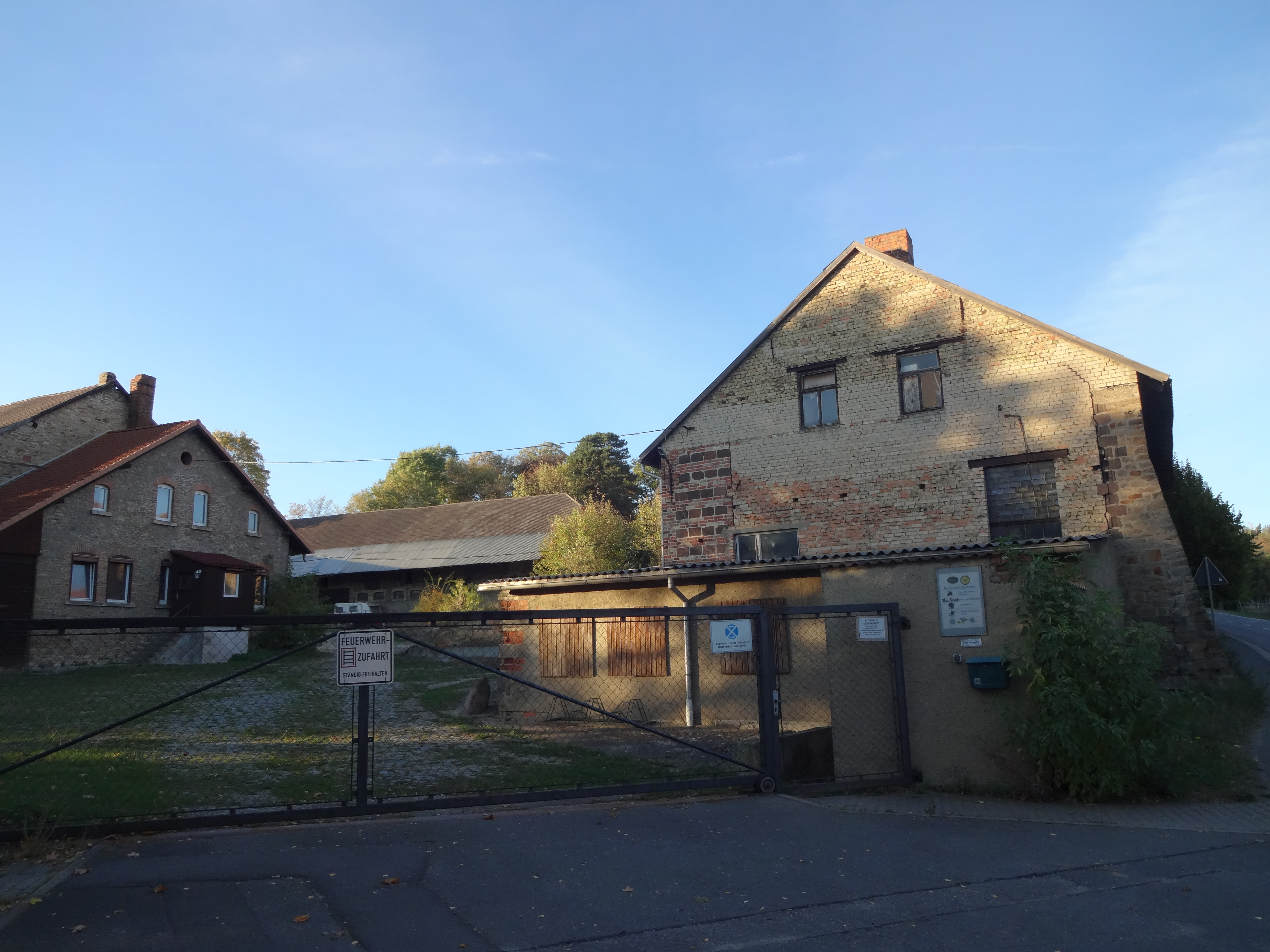 denkmalgeschütztes Rittergut Cattenstedt